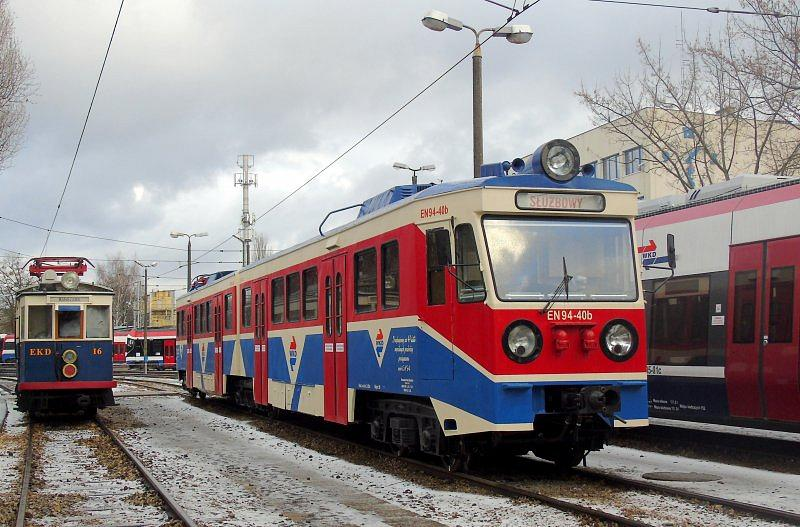 Elektryczny zespół trakcyjny EN94-40 po renowacji prezentowany podczas dnia otwartego Warszawskiej Kolei Dojazdowej na terenie zaplecza technicznego tego przewoźnika przy stacji Grodzisk Mazowiecki Radońska.